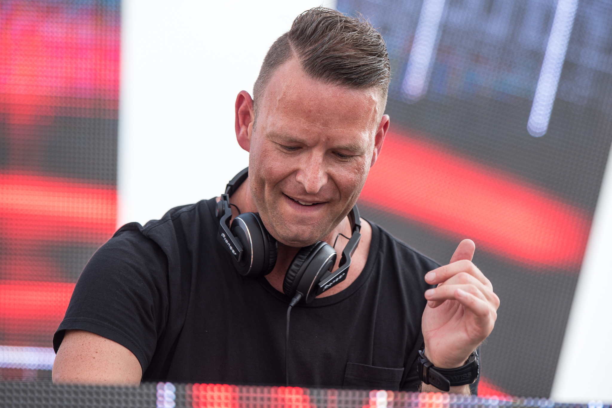 3rd Stage,Evil Activities,Festival,Kelly van Soest,Konzert,Livekonzert,Livemusik,Max Enforcer,Musik,Open Beatz 2016